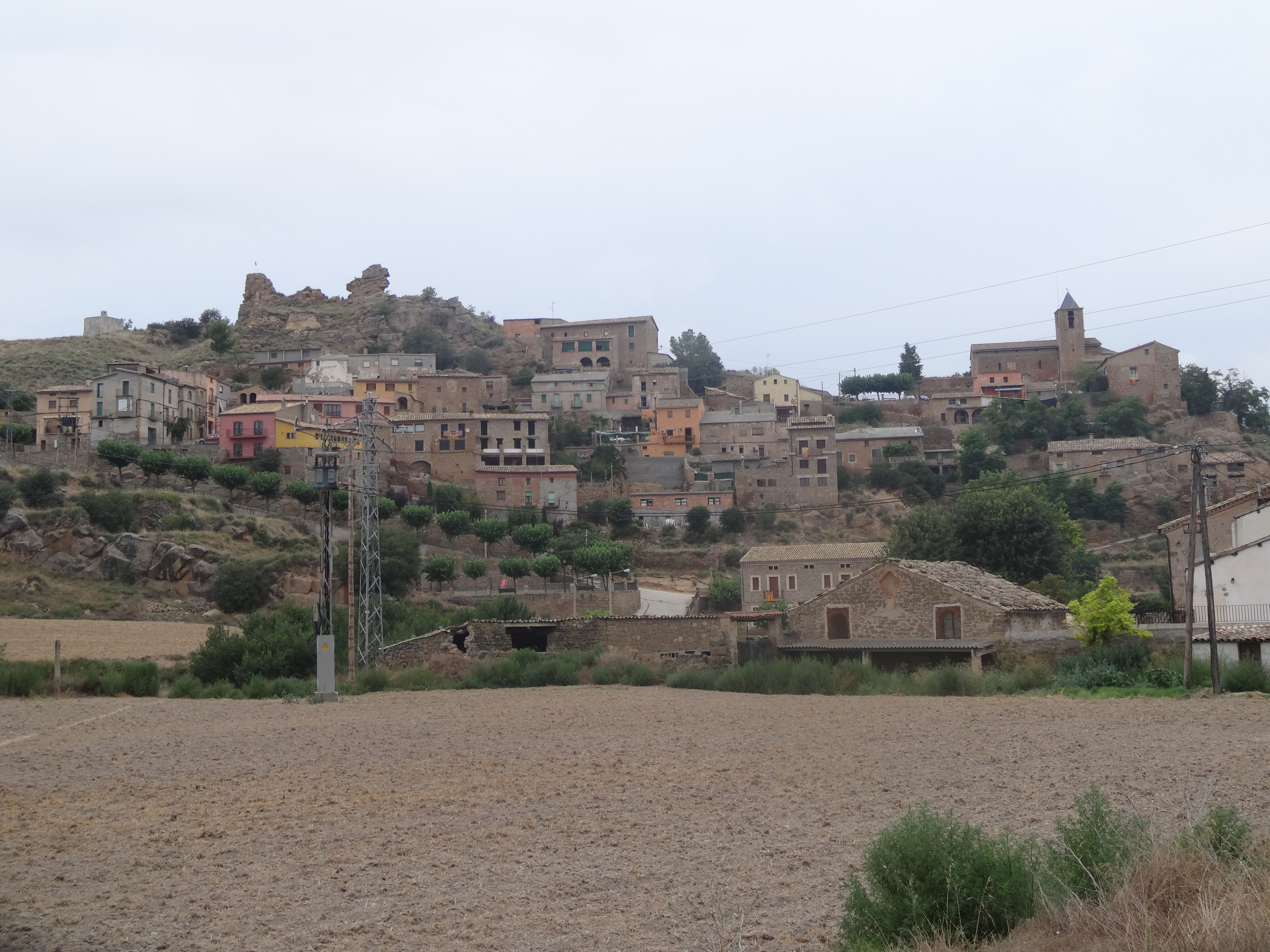 Oliola